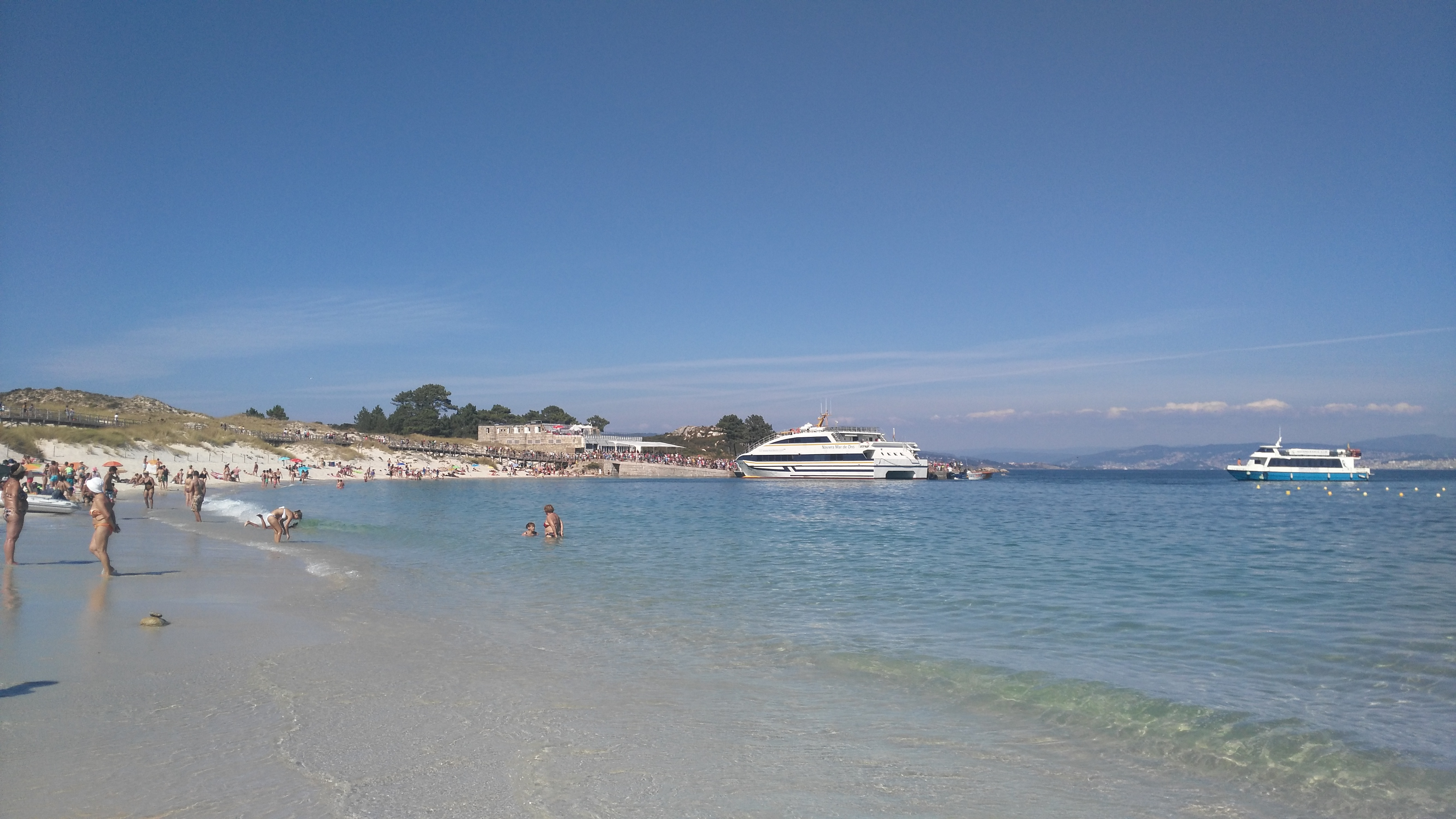 Praia e embaradeiro das Cíes